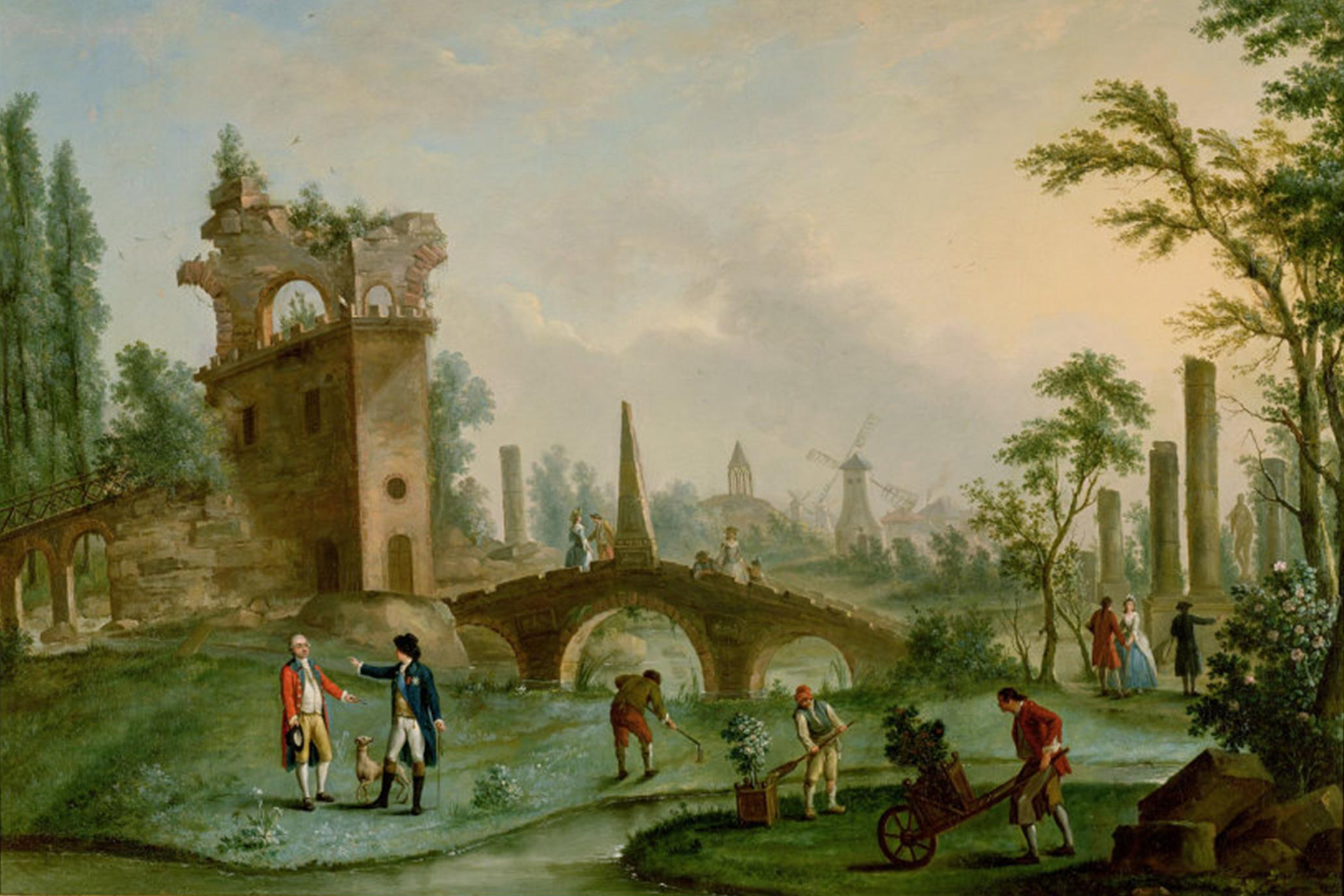 "Carmontelle présentant les clefs du parc Monceau au duc de Chartres" ("Carmontelle giving the Keys of the Parc Monceau in Paris to the Duke of Chartres").